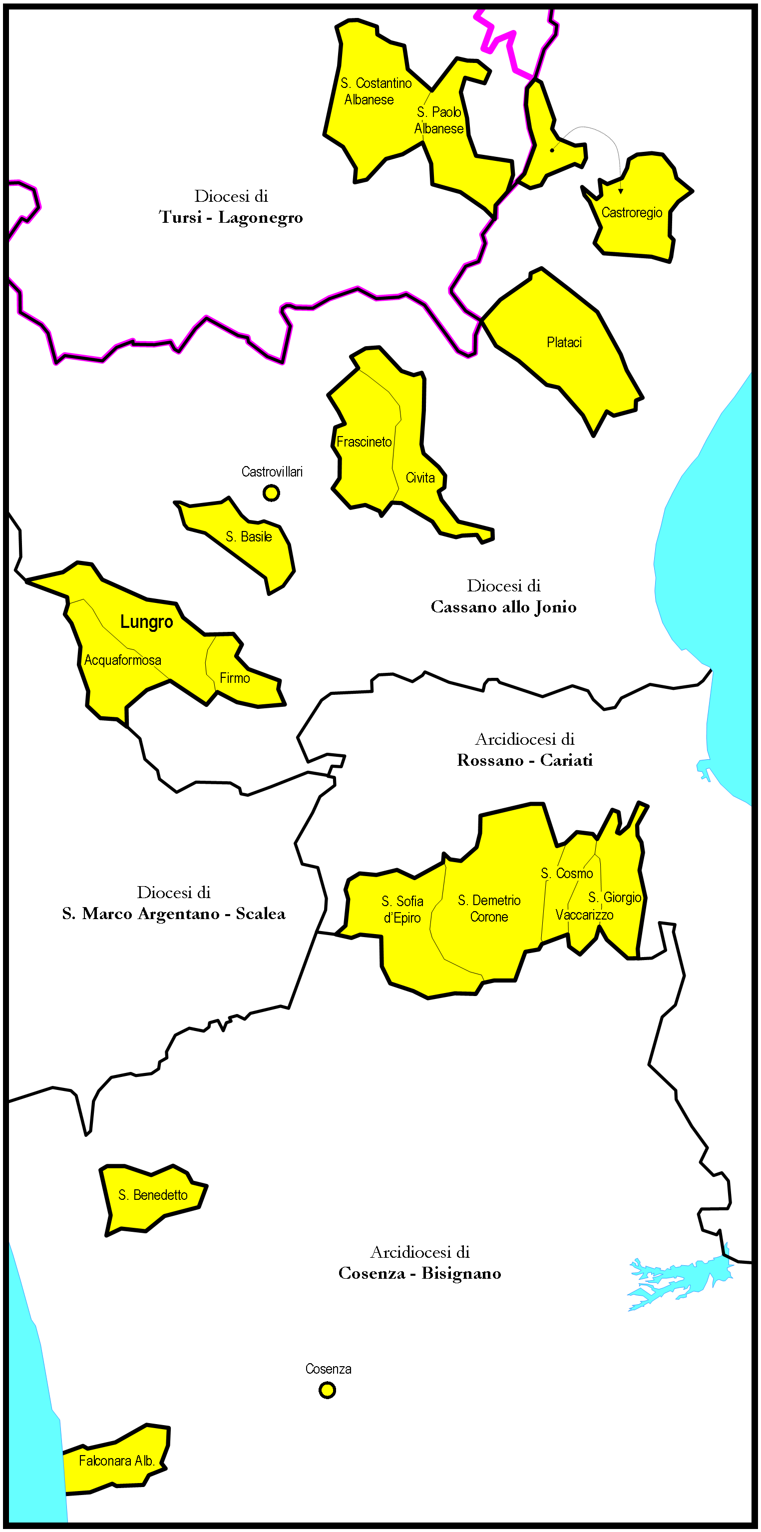 Mappa dell'Eparchia di Lungo degli Italo Albanesi